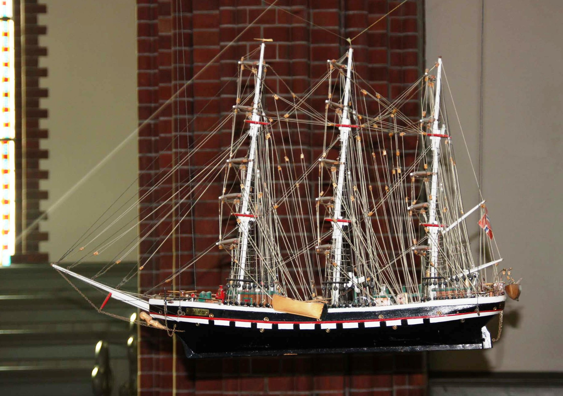 Kirkeskipet Varg i Trefoldighetskirken i Arendal